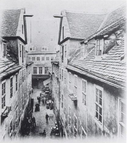 Leipzig, Brühl 13, "Zur Grünen Tanne" Hausbesitzer Moritz Lazarus 1872-1892. Wahrscheinlich entgegen Blickrichtung Theatergasse (spätere Richard-Wagner-Straße).